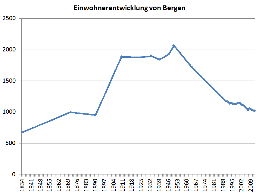 Diagramm der Einwohnerentwicklung von Bergen im Vogtland